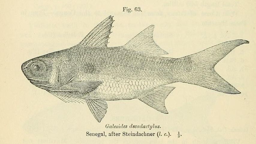 Galeoides decadactylus